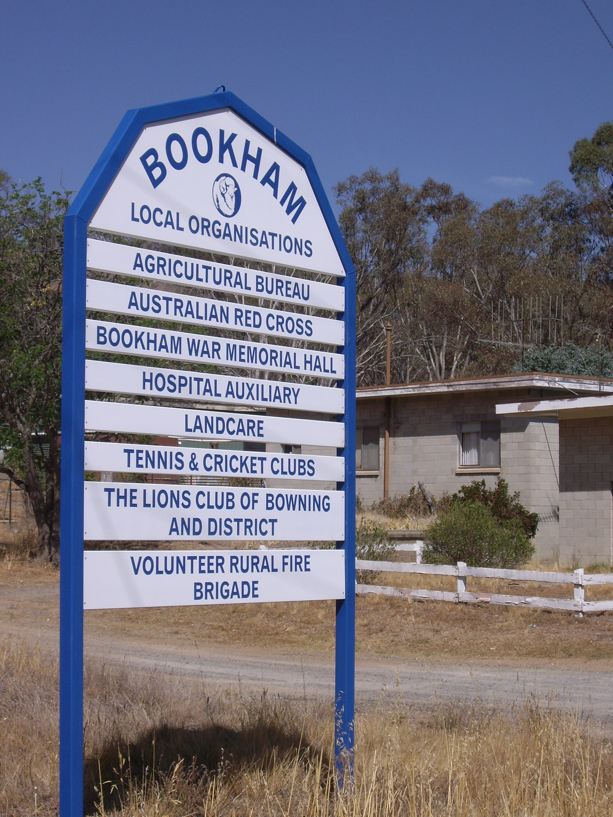 Entering Bookham